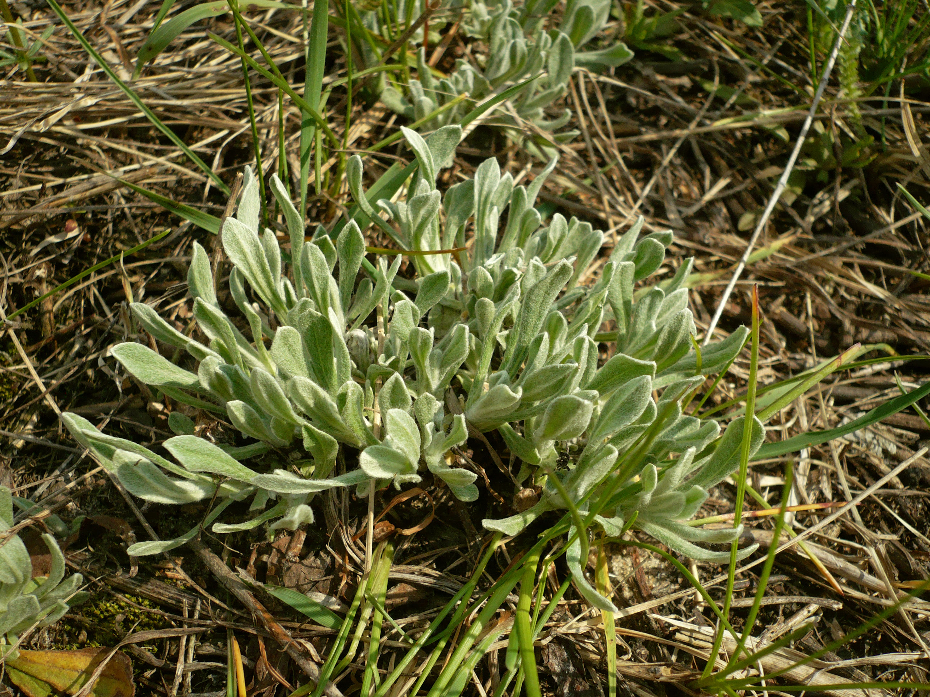 Бессмертник, или Цмин песчаный (Helichrysum arenarium). Балка Каменный Лог, Белгородская область.